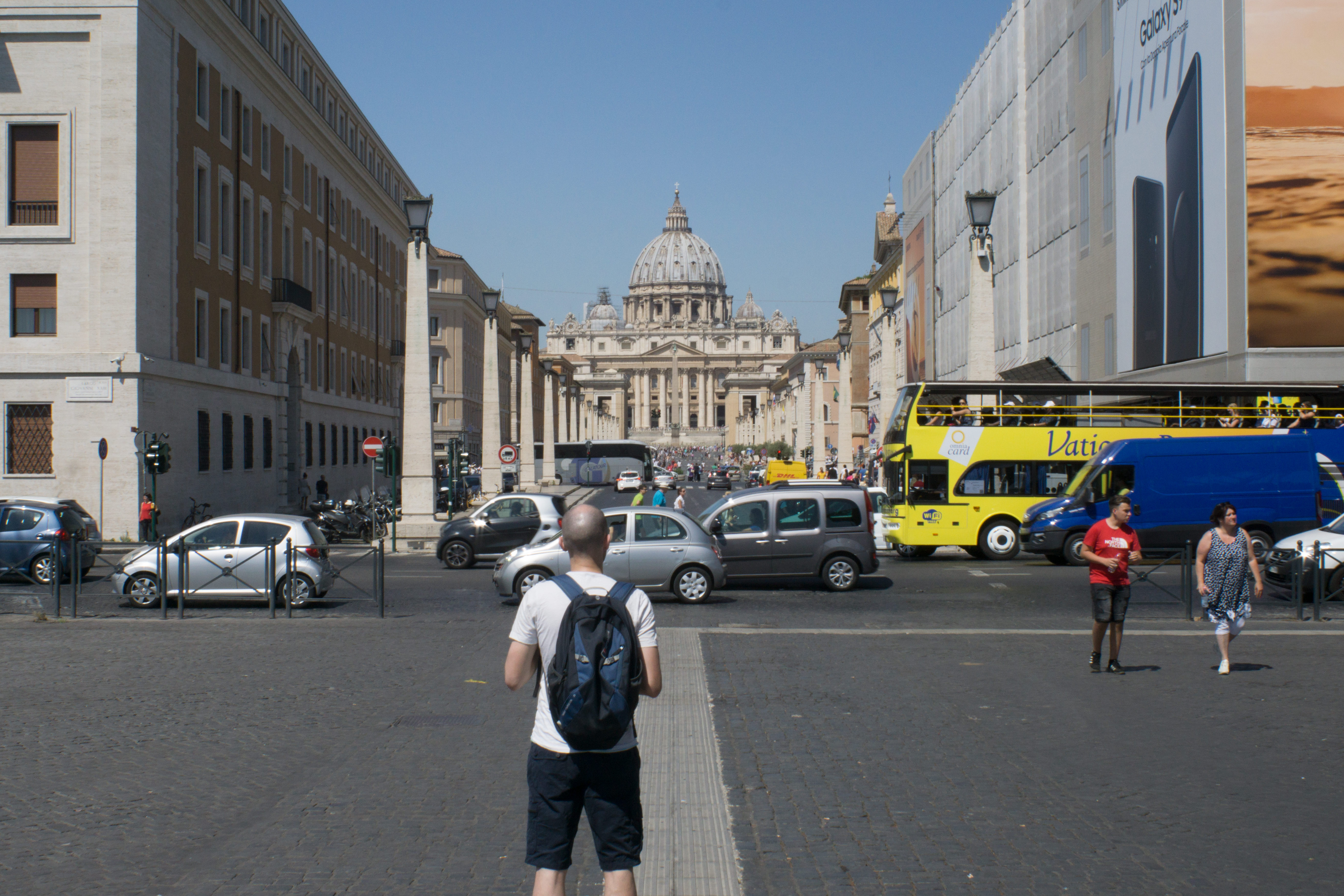 Billedet er taget med mellem peterskirken i Engelsborg